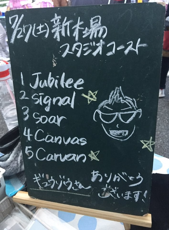 amiinAセトリボード